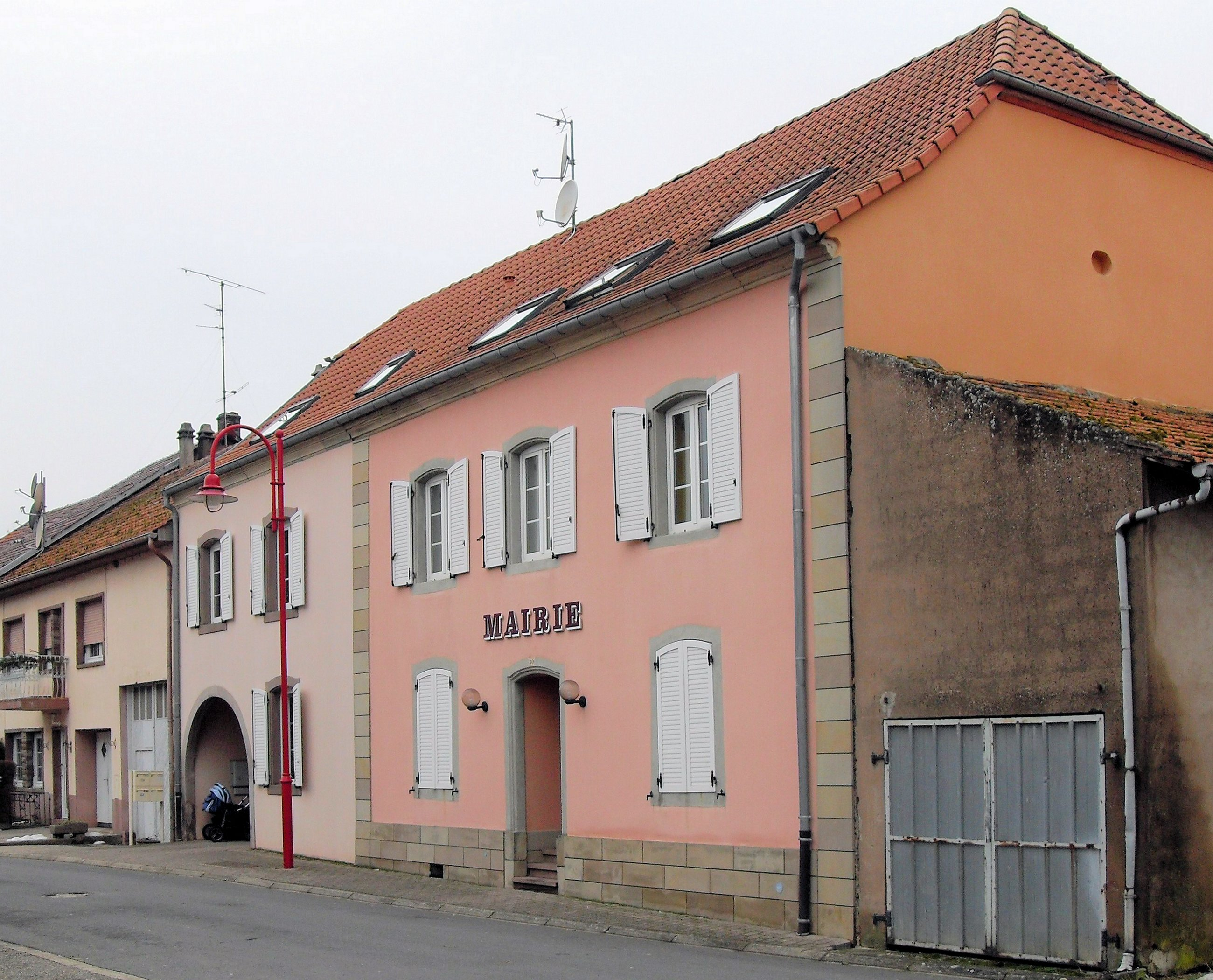 La mairie deVeckersviller